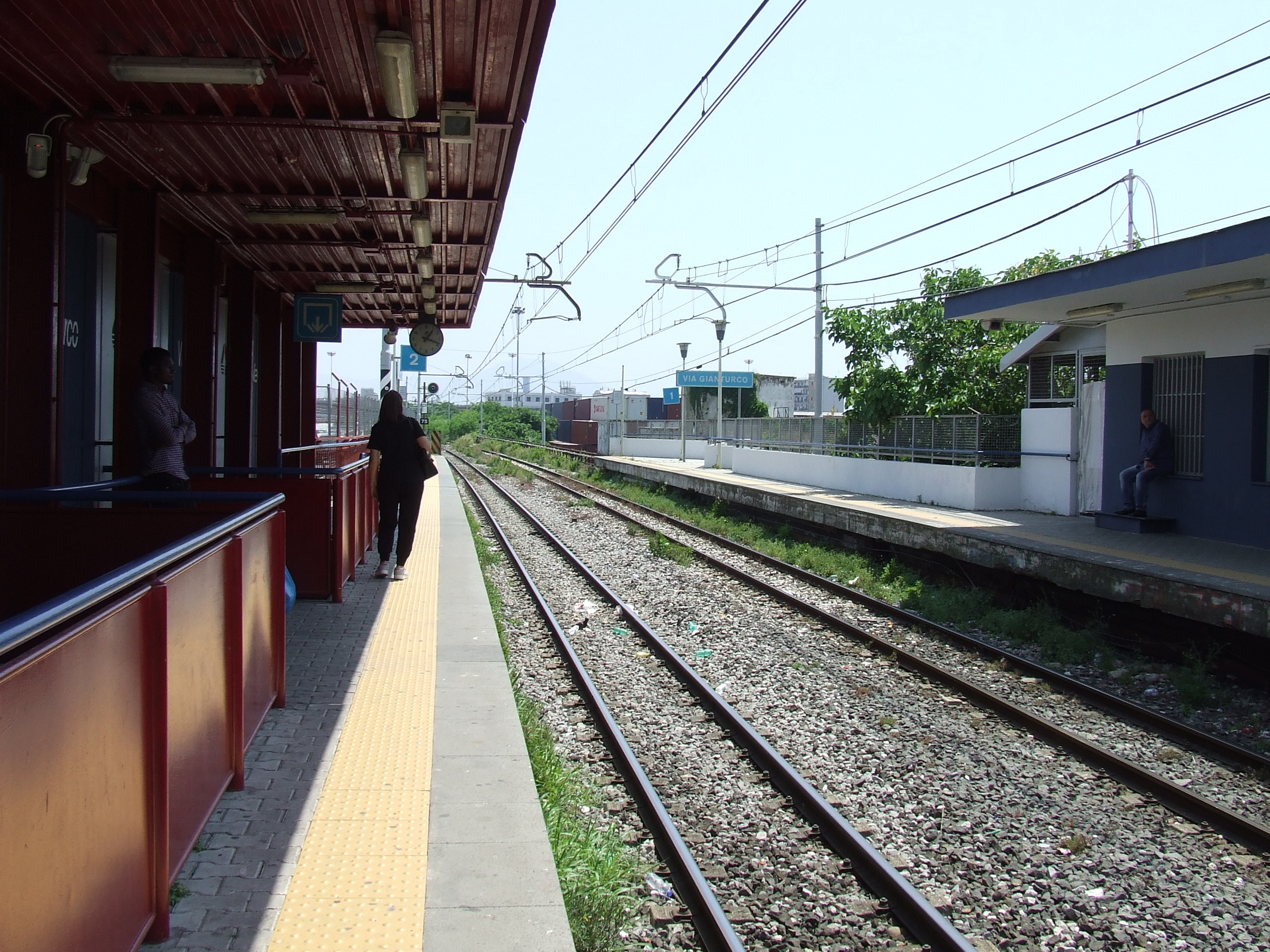 Stazione Via Gianturco, linea Napoli - Pompei, Circumvesuviana, EAV - banchine su viadotto